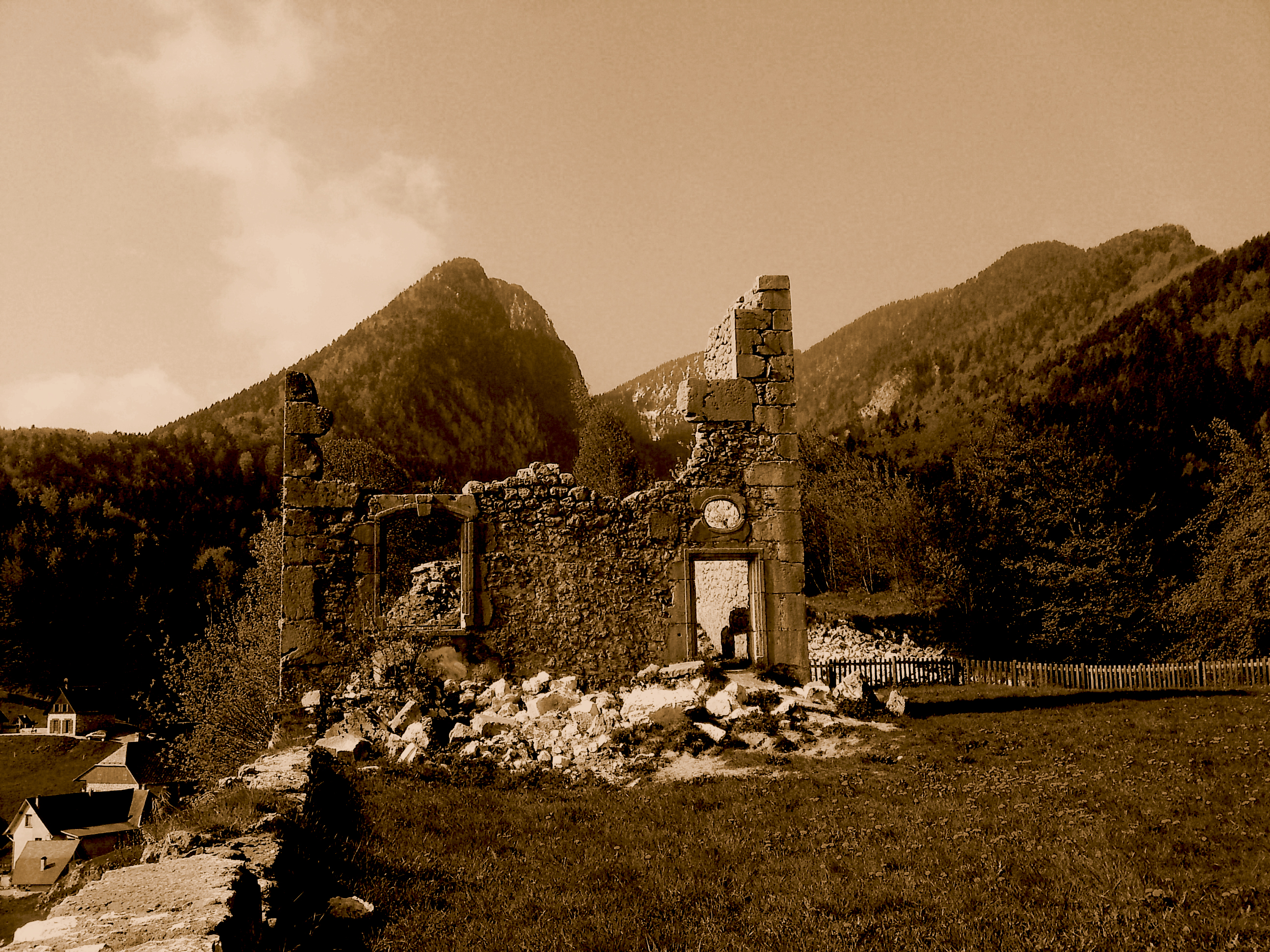 château du Gouvernement ou de Saint-Pierre ou Château-Neuf d'Entremont ou encore de Montbel à Saint-Pierre-d'Entremont (Isère), France.